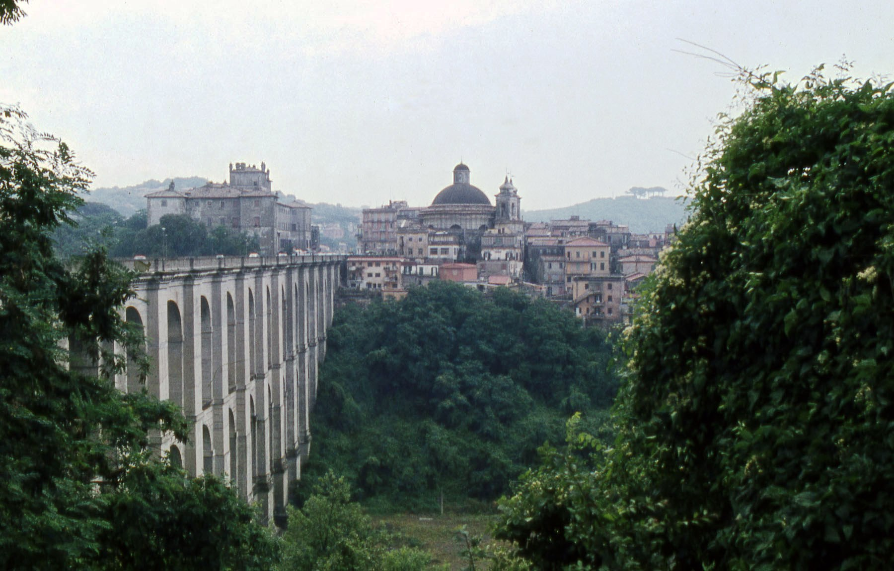 Ariccia e il ponte 1983 Licensing Categoria:Immagini di Indeciso 42 controllate